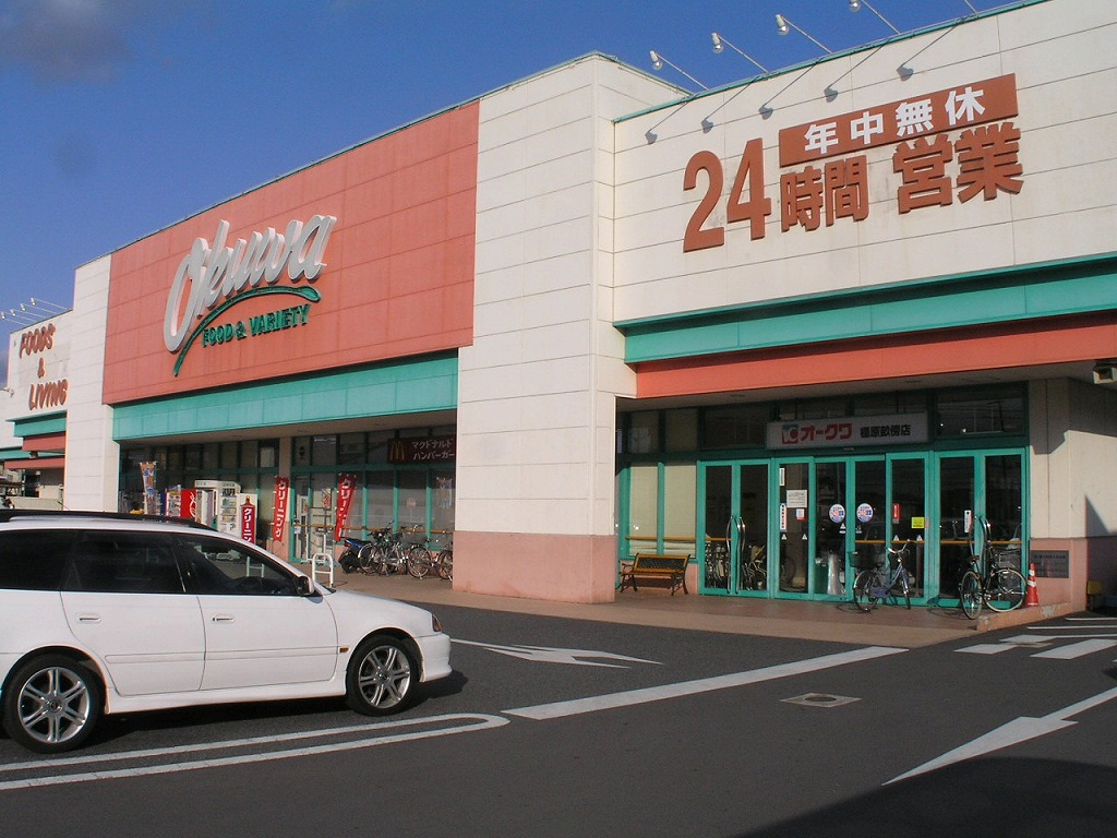 株式会社オークワ 橿原畝傍店